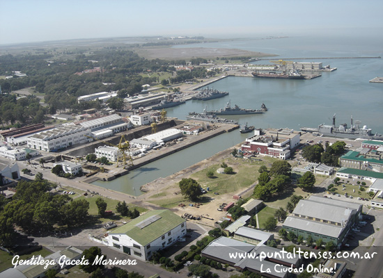 Dique